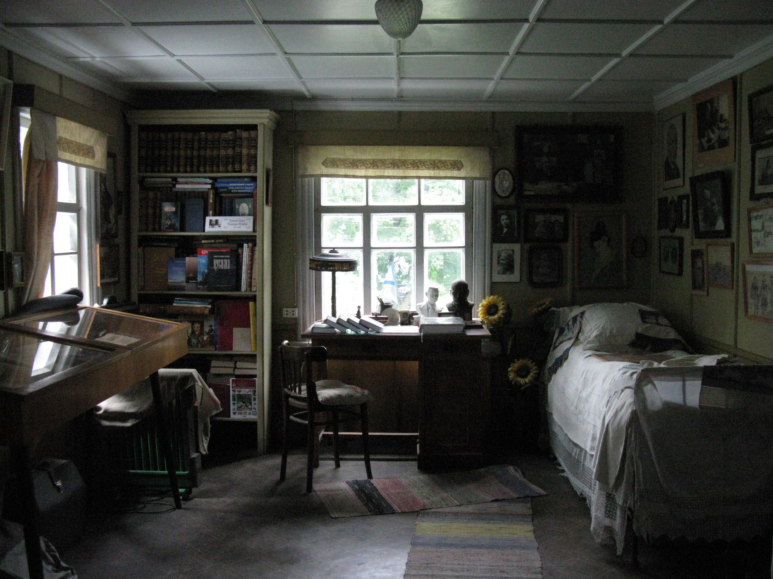 Комната А.С. Новикова-Прибоя на его даче в Черкизово